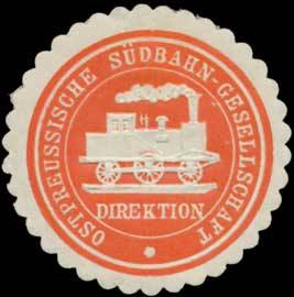 Siegelmarke Ostdeutsche Südbahn-Gesellschaft